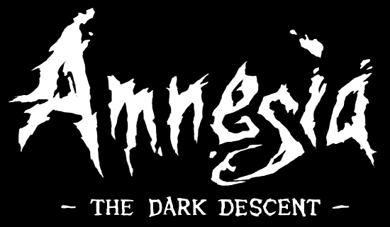 Logo des Computerspiels Amnesia: The Dark Descent.